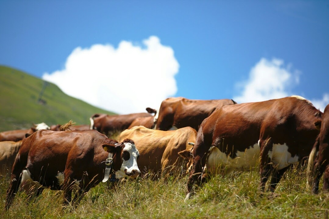 Un alpage sur les hauteur de Fontcouverte La Toussuire